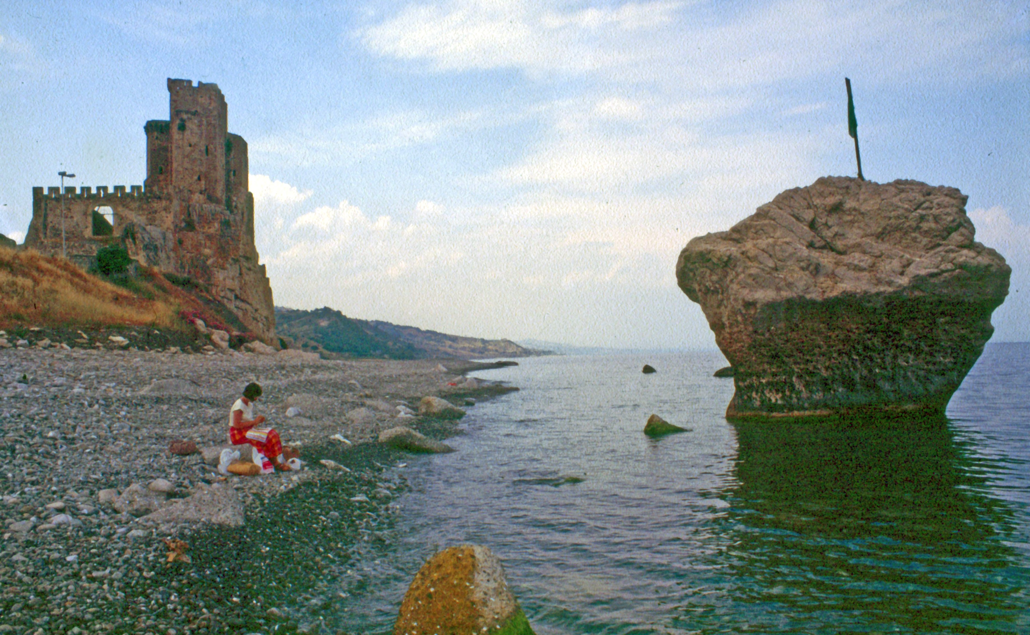 Roseto Capo Spulico, Castello della Pietra